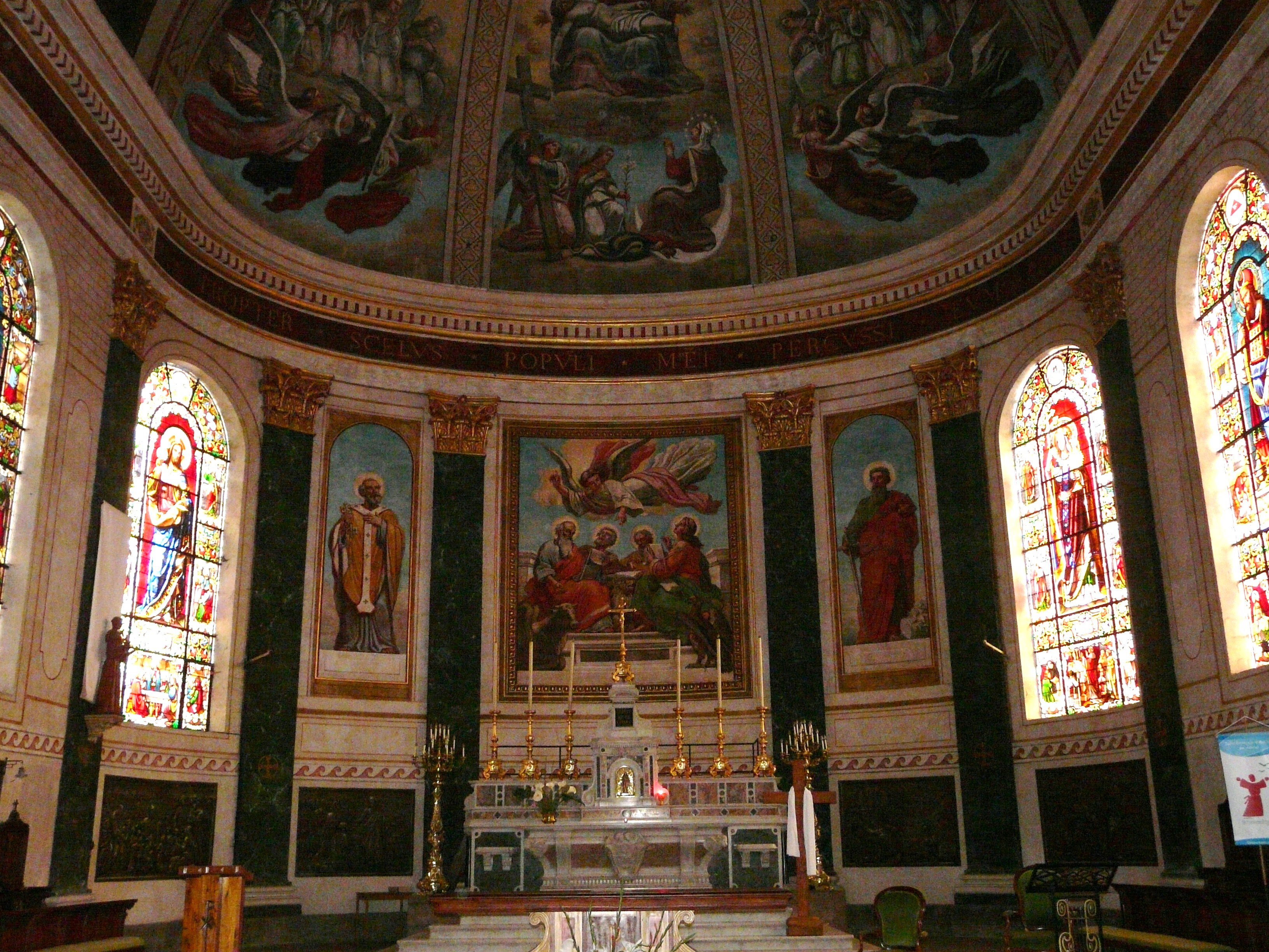 Le chœur de l'église Saint-Nicolas de Nérac, Lot-et-Garonne, France. Les peintures sont l'œuvre de Gustave Lassalle-Bordes, et l'autel-tabernacle, celle de Bernard Jabouin (1810-1889).